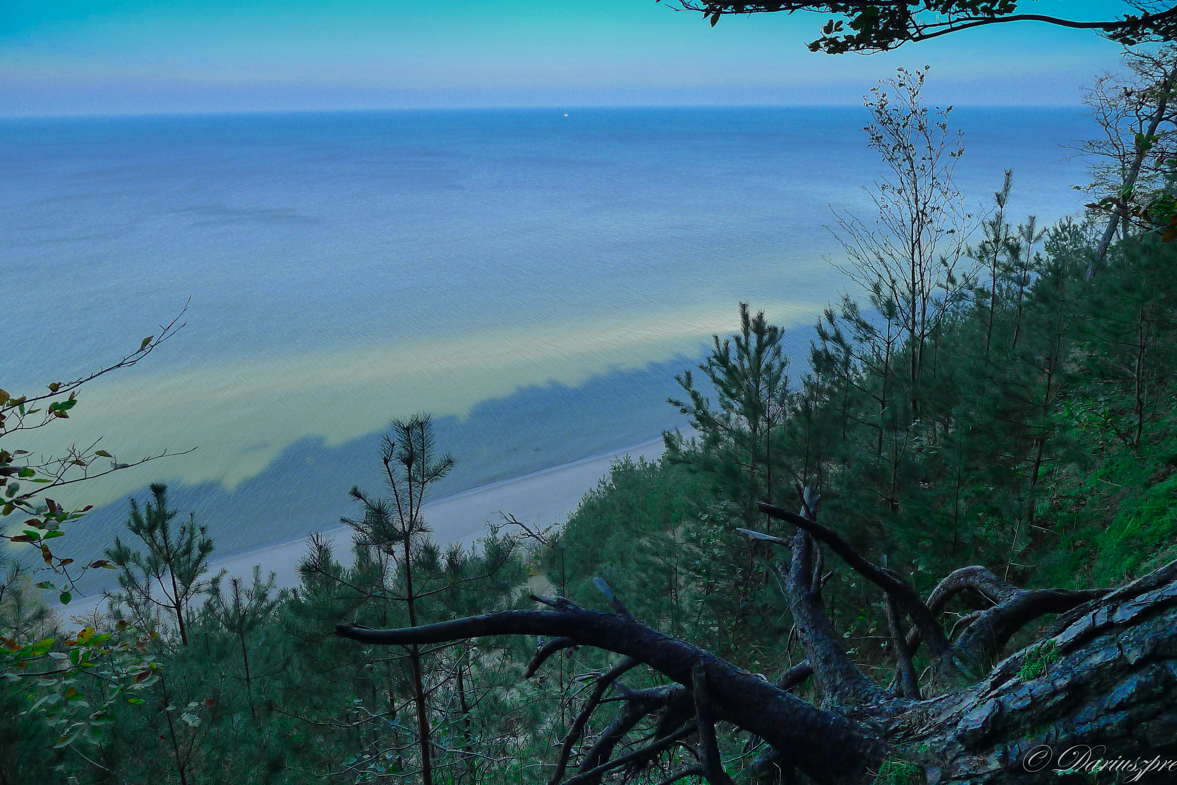 30 metrow n.p.m.